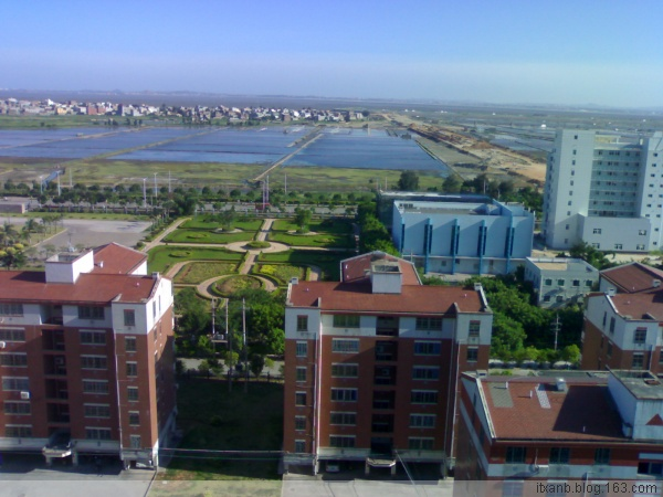 泉港庄园明珠上看泉港城区10